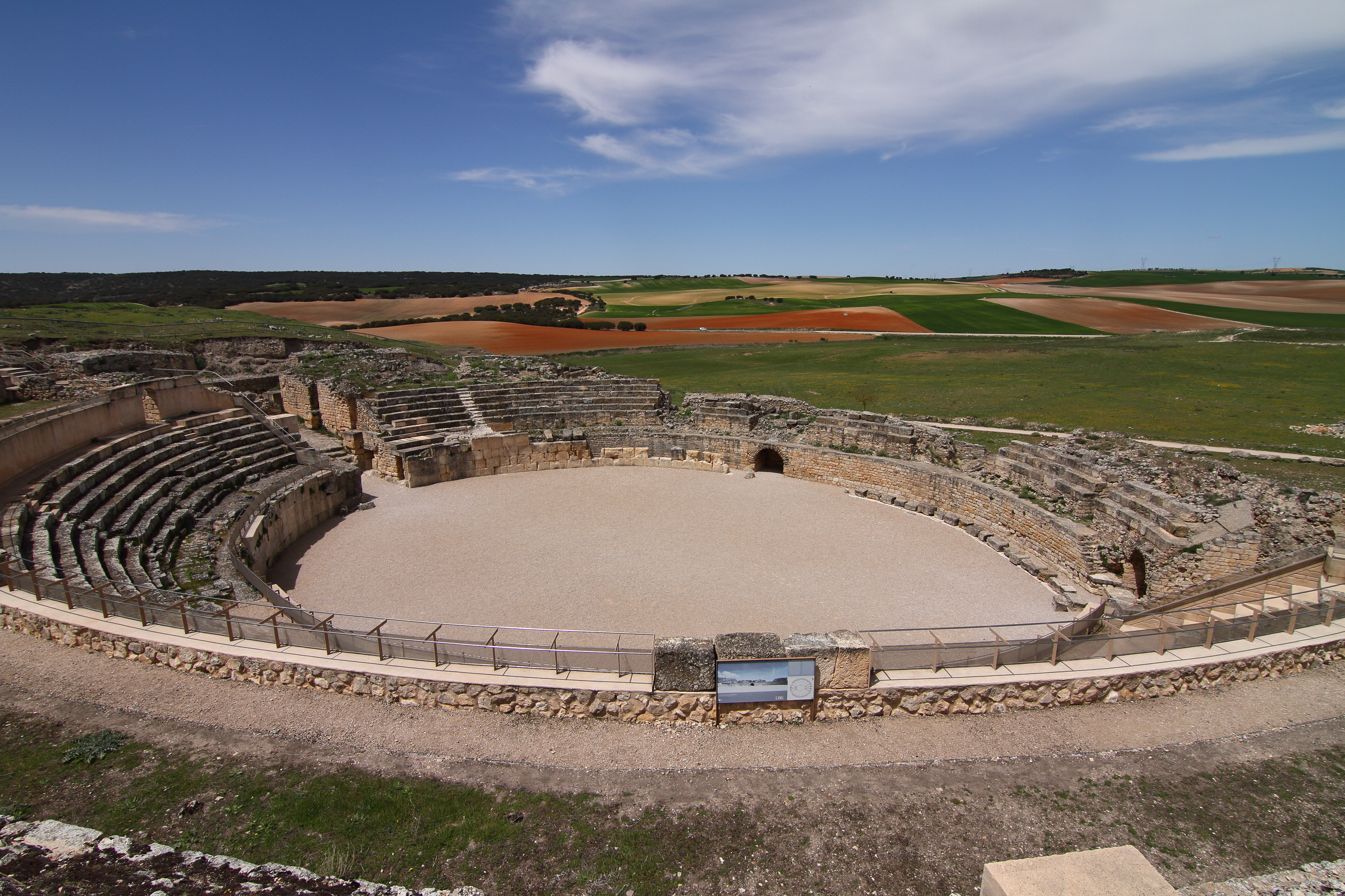 Segóbriga, anfiteatro, vista general